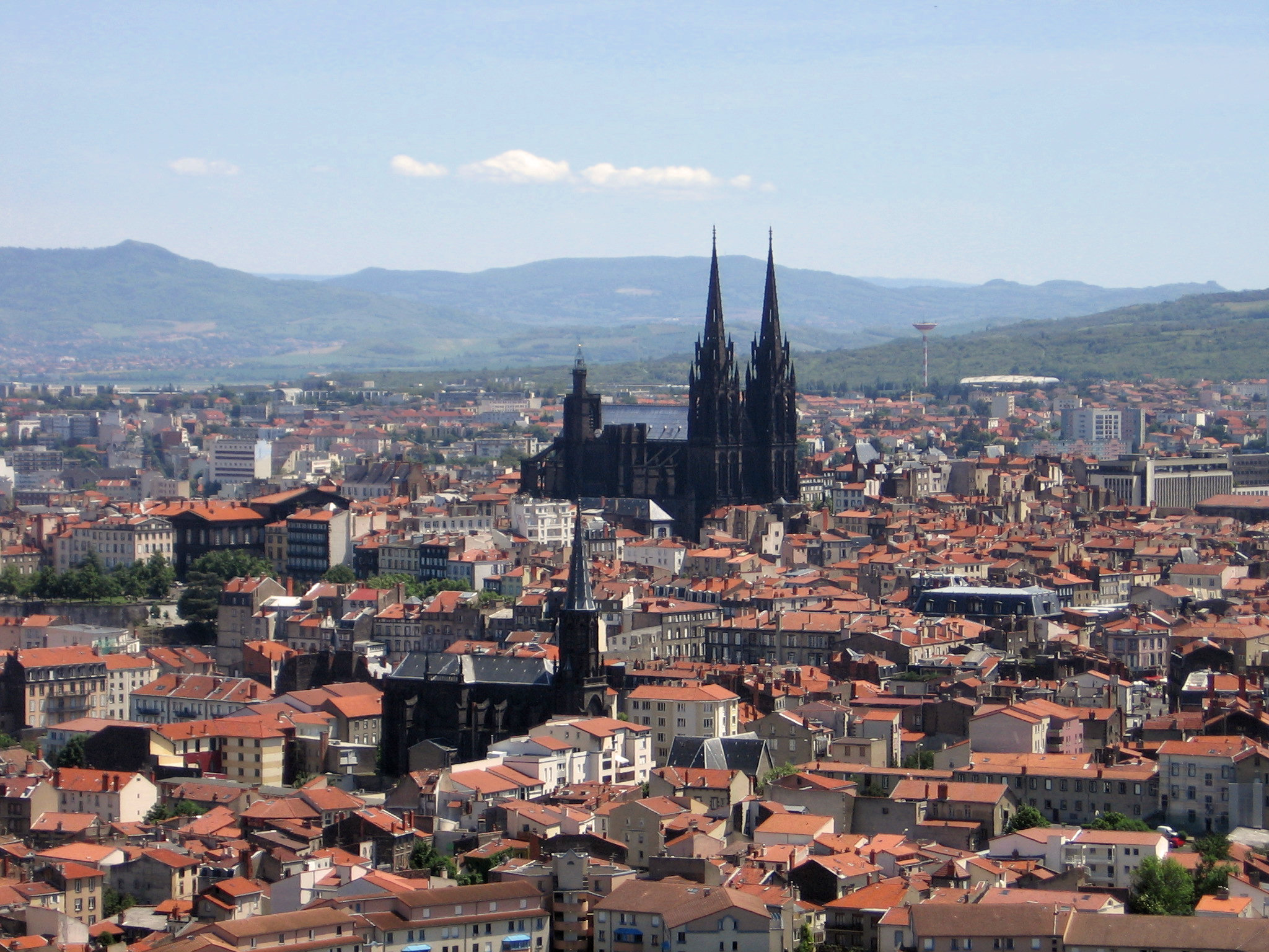 Clermont-Ferrand seen from Montjuzet Park